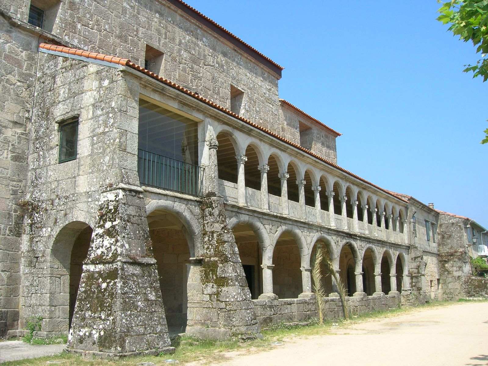 Mosteiro de San Salvador de Lérez